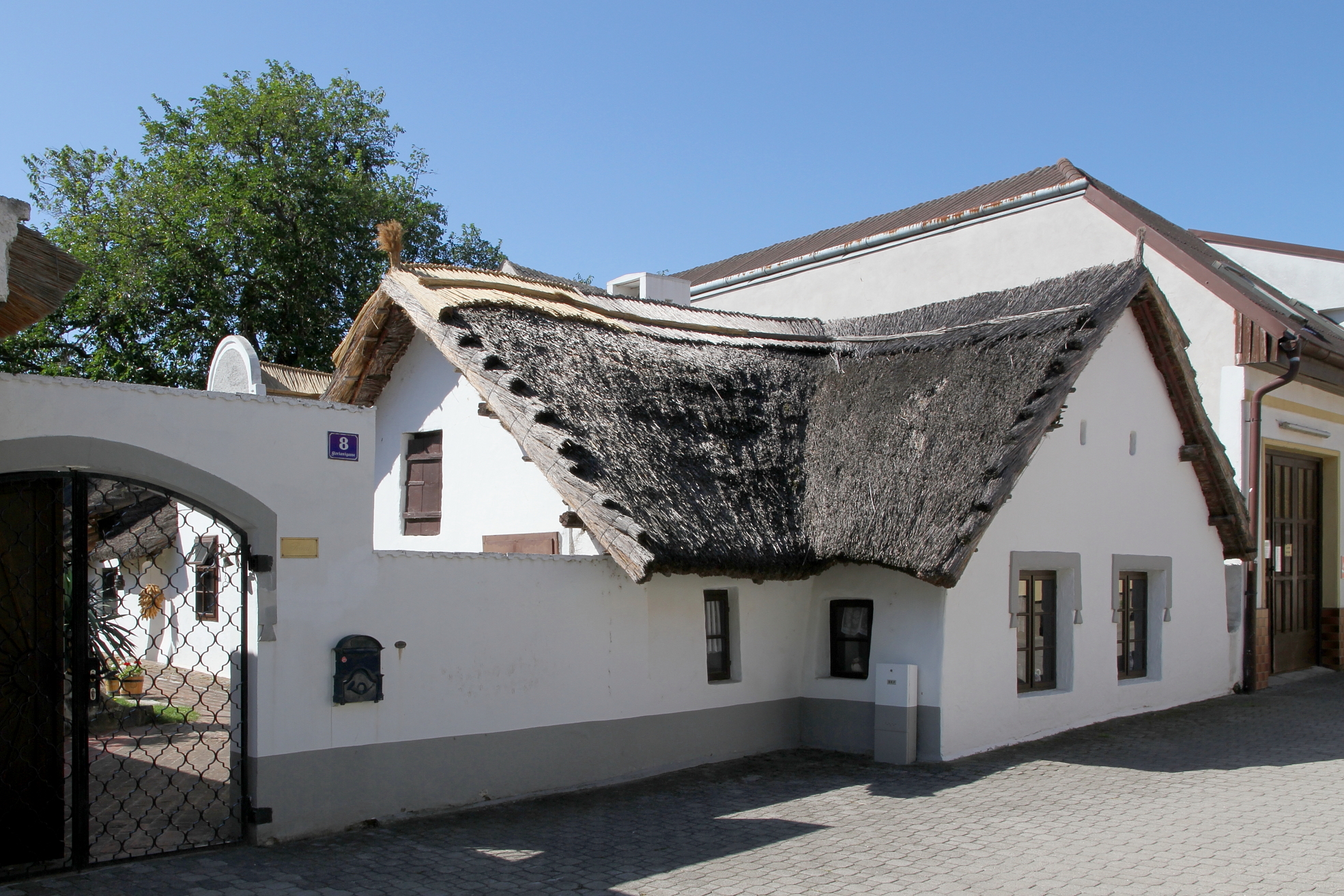 Ehemaliges Bauernhaus und jetziges Heimathaus der burgenländischen Gemeinde Illmitz. Ein eingeschossiger Bau mit barockisiertem Volutengiebel und Rohrdeckung. 1954 plaques for cultural property protected by the Hague Convention in Austria